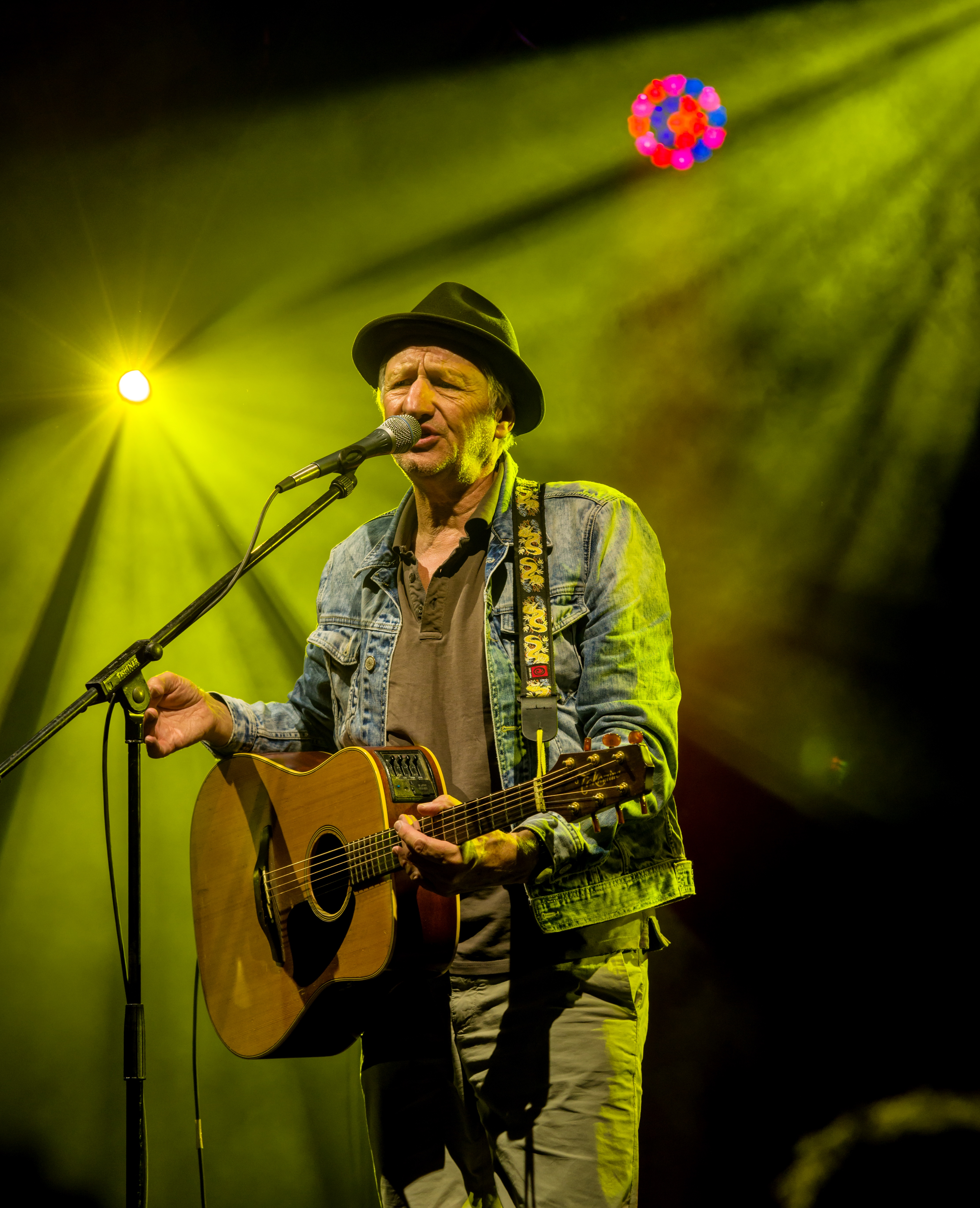 Bilder vom Zelt Musik Festival 2017 in Freiburg im Breisgau Georg Ringsgwandl und Band